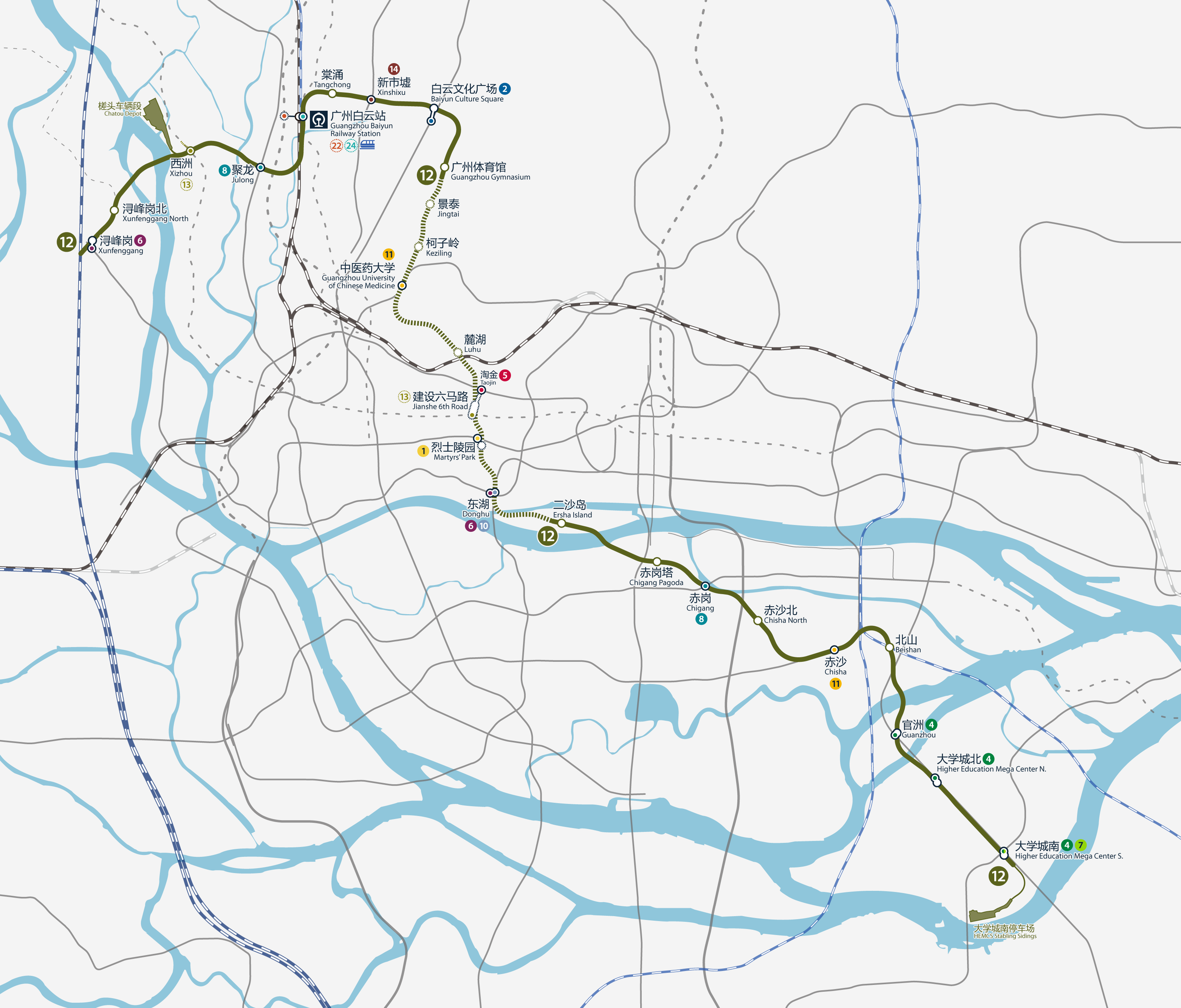 廣州地鐵12號線路線圖，按真實走向比例繪畫